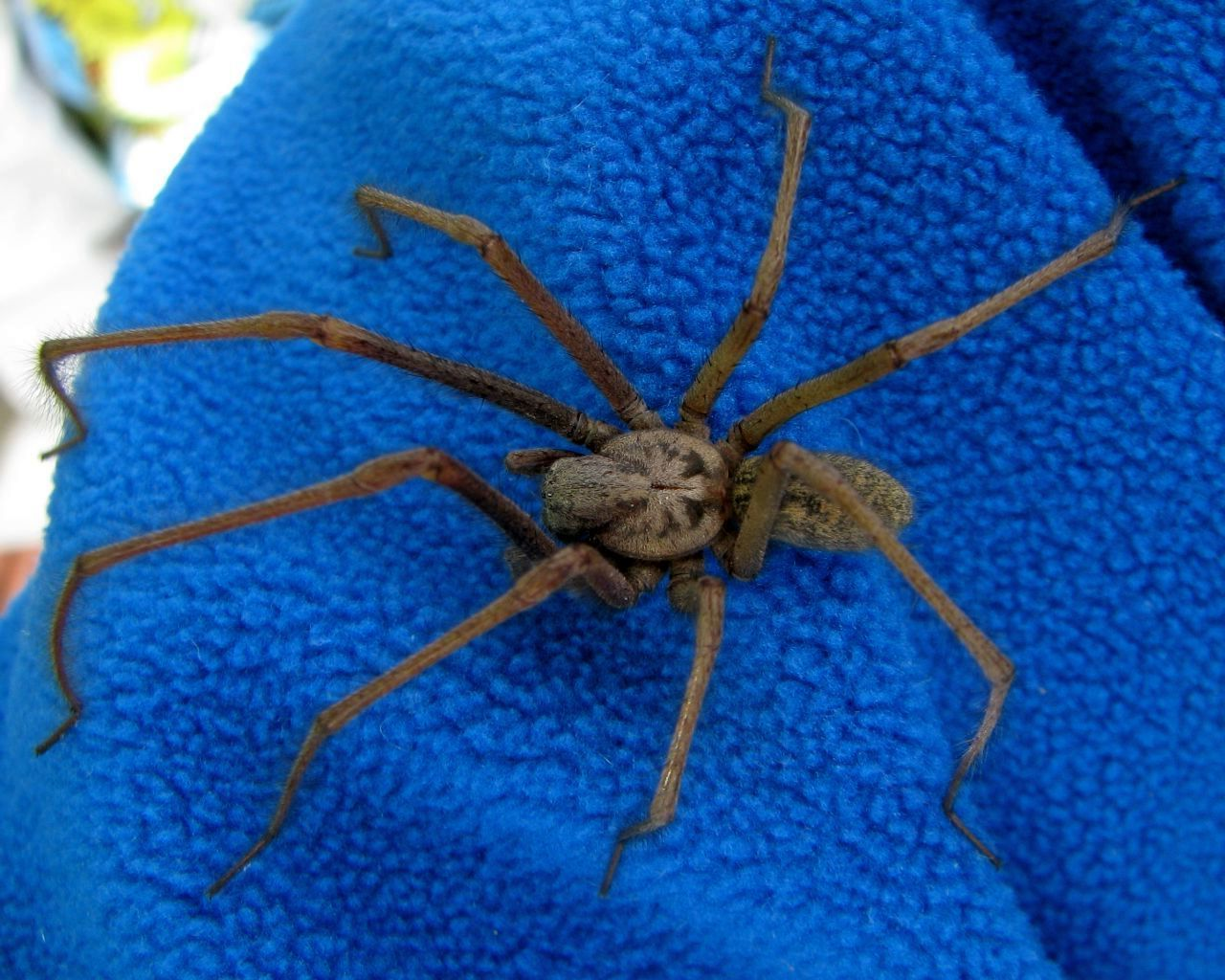 På høsten er stor husedderkopp Tegenaria atrica ofte å finne inne i hus hvor hannene leter etter hunner. De kan bli riktig store. Template:Byline